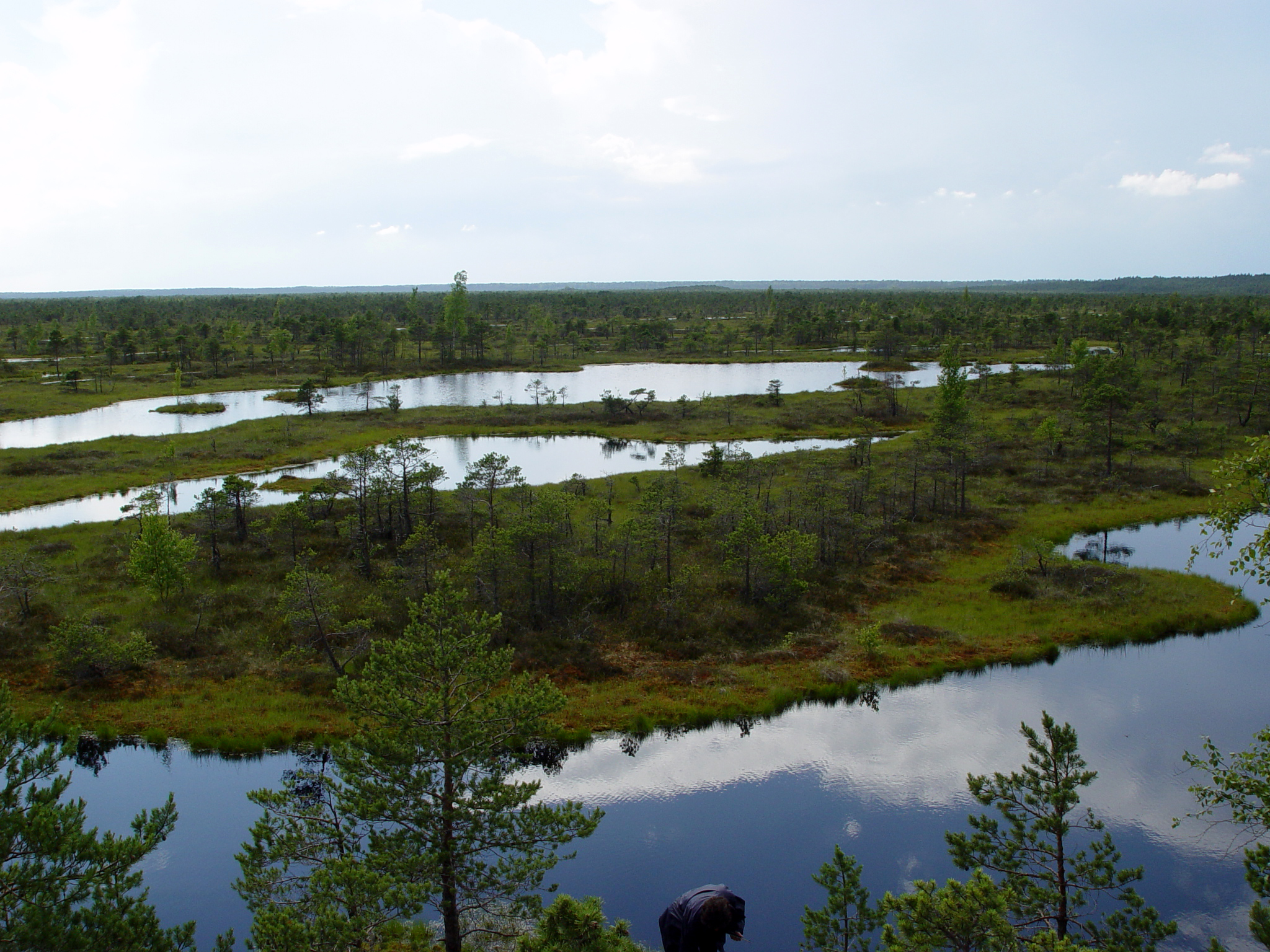 Great Kemeri Bog